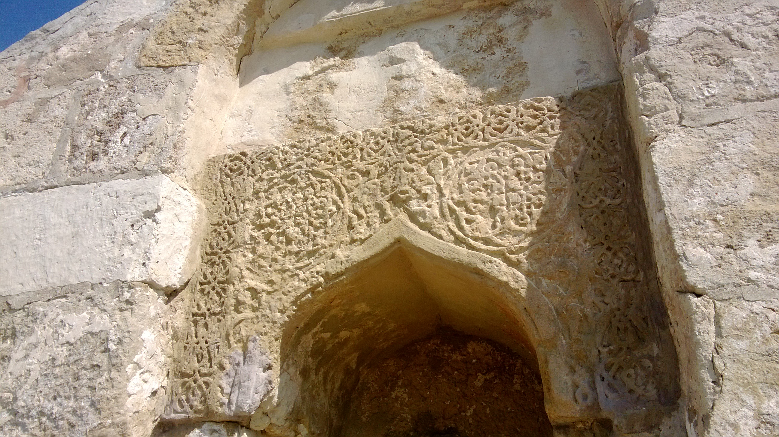 Комплекс памятников архитектуры XIII-XIV вв. на территории Булгарского городища (архитектурный комплекс «Болгары») (Республика Татарстан, Болгар, село Болгары, городище)